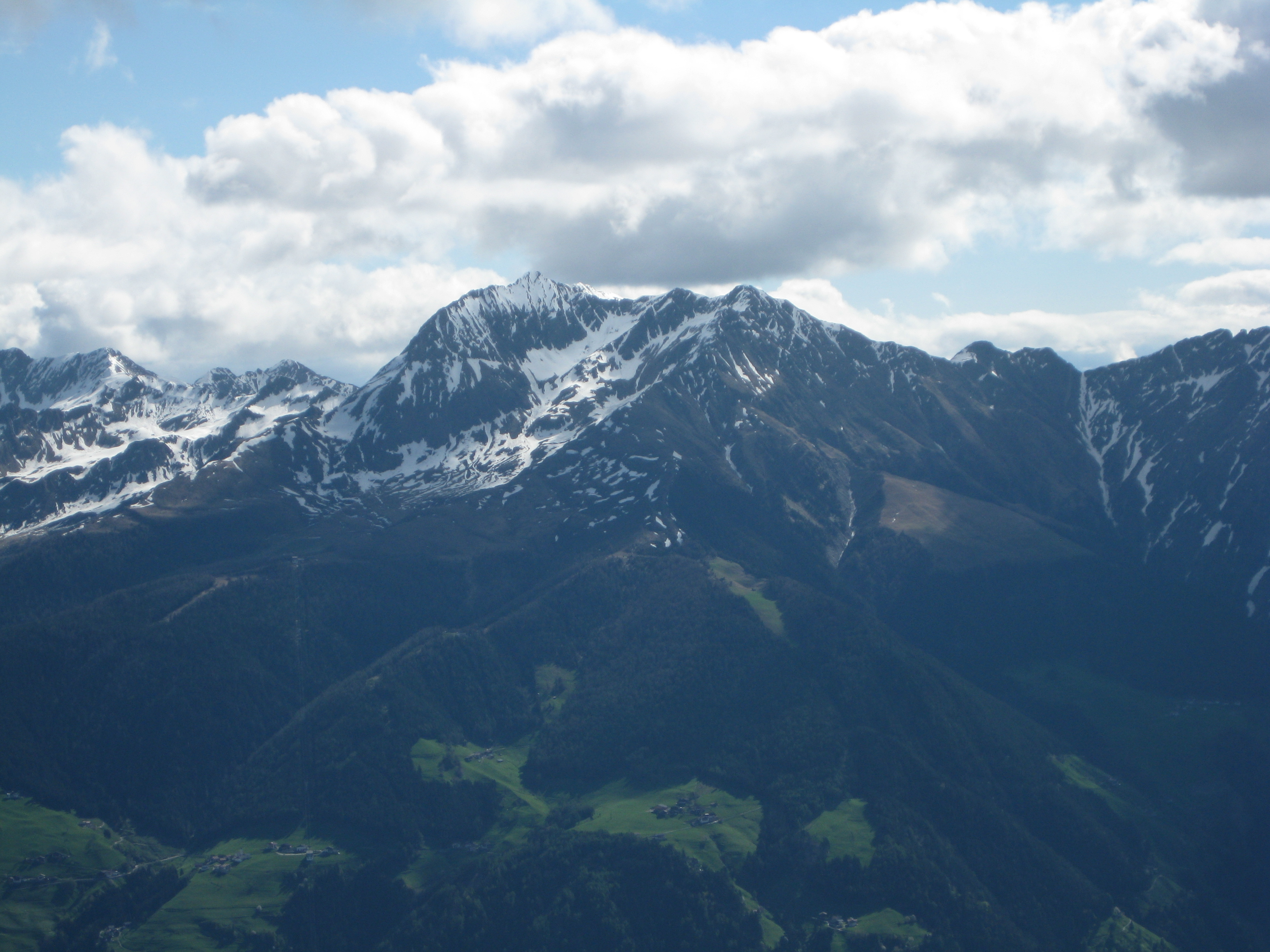 Der Hirzer von der Mutspitze aus gesehen